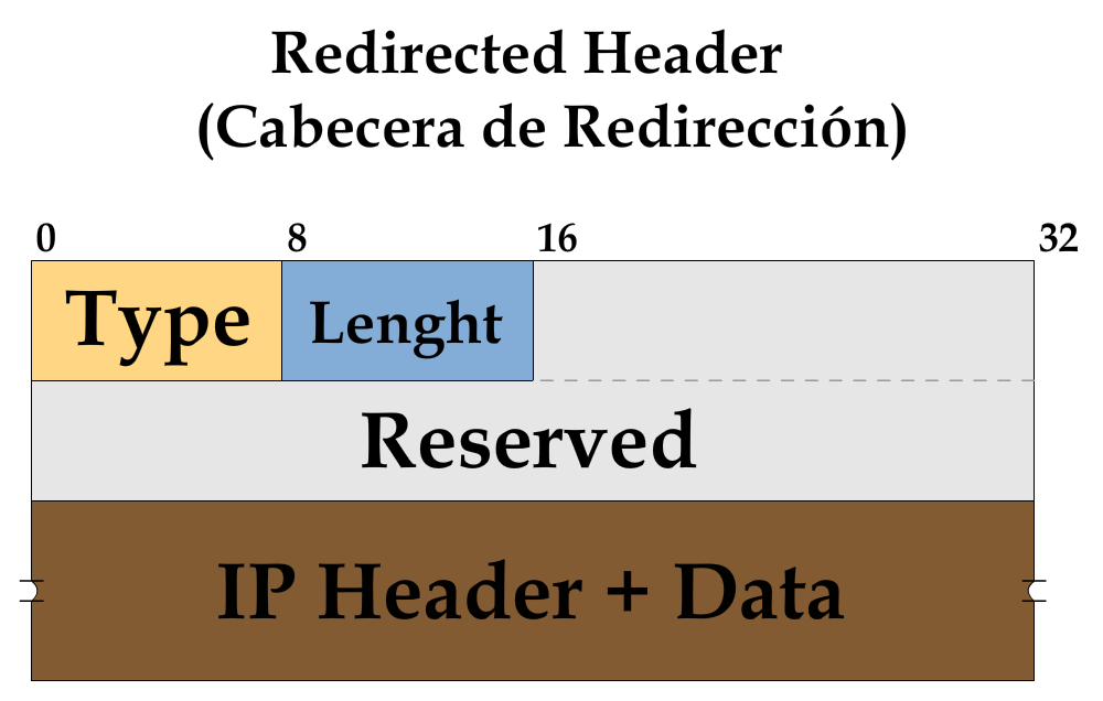 Formato de mensaje de opción ICMPv6 sobre la redirección de la cabecera.